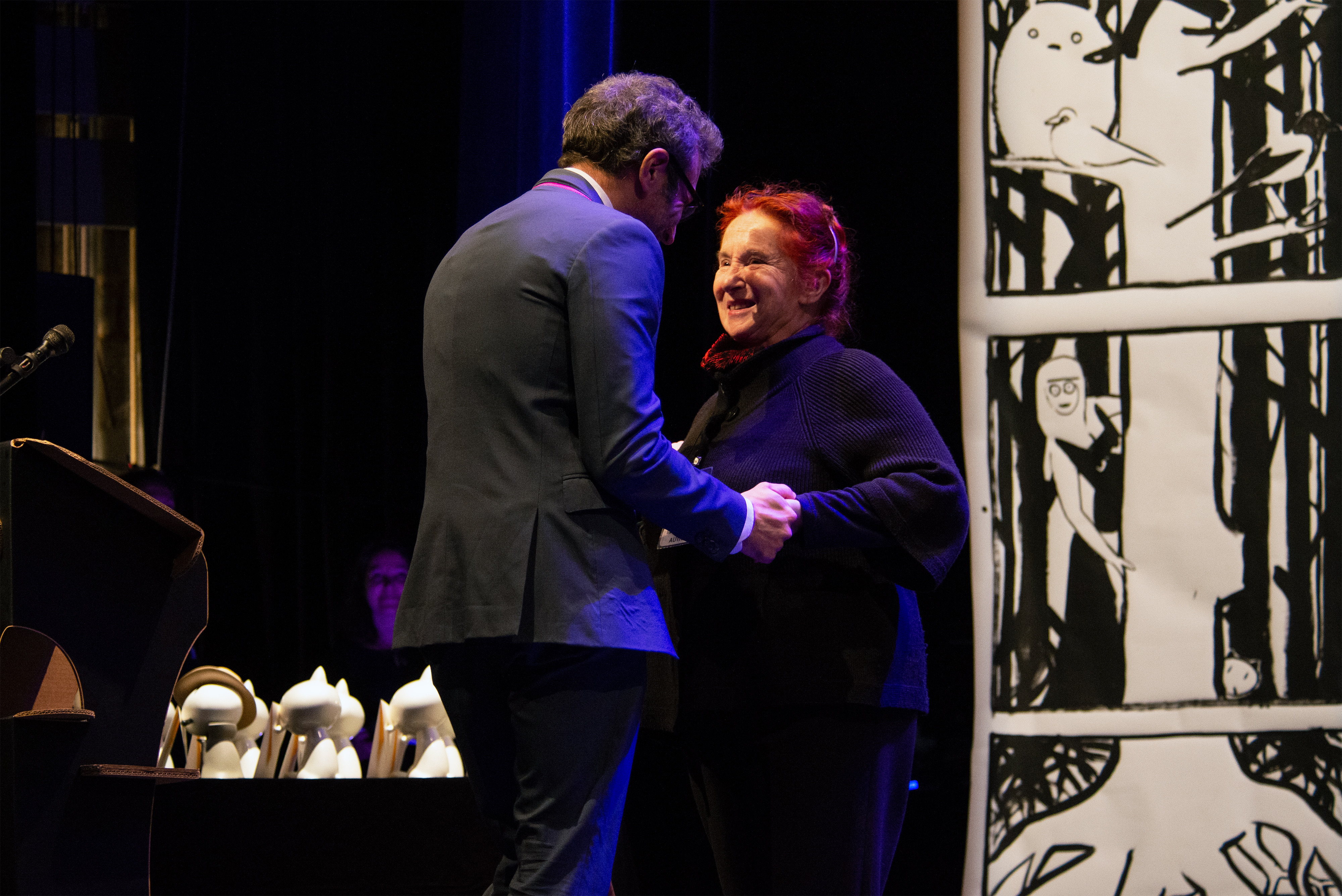 Fauve d'honneur remis à Nicole Claveloux - Cérémonie des Fauves, Festival International de la Bande Dessinée d'Angoulême 2020.